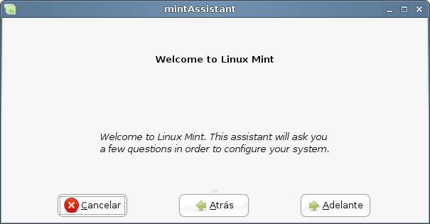 MintAssistant_1.9